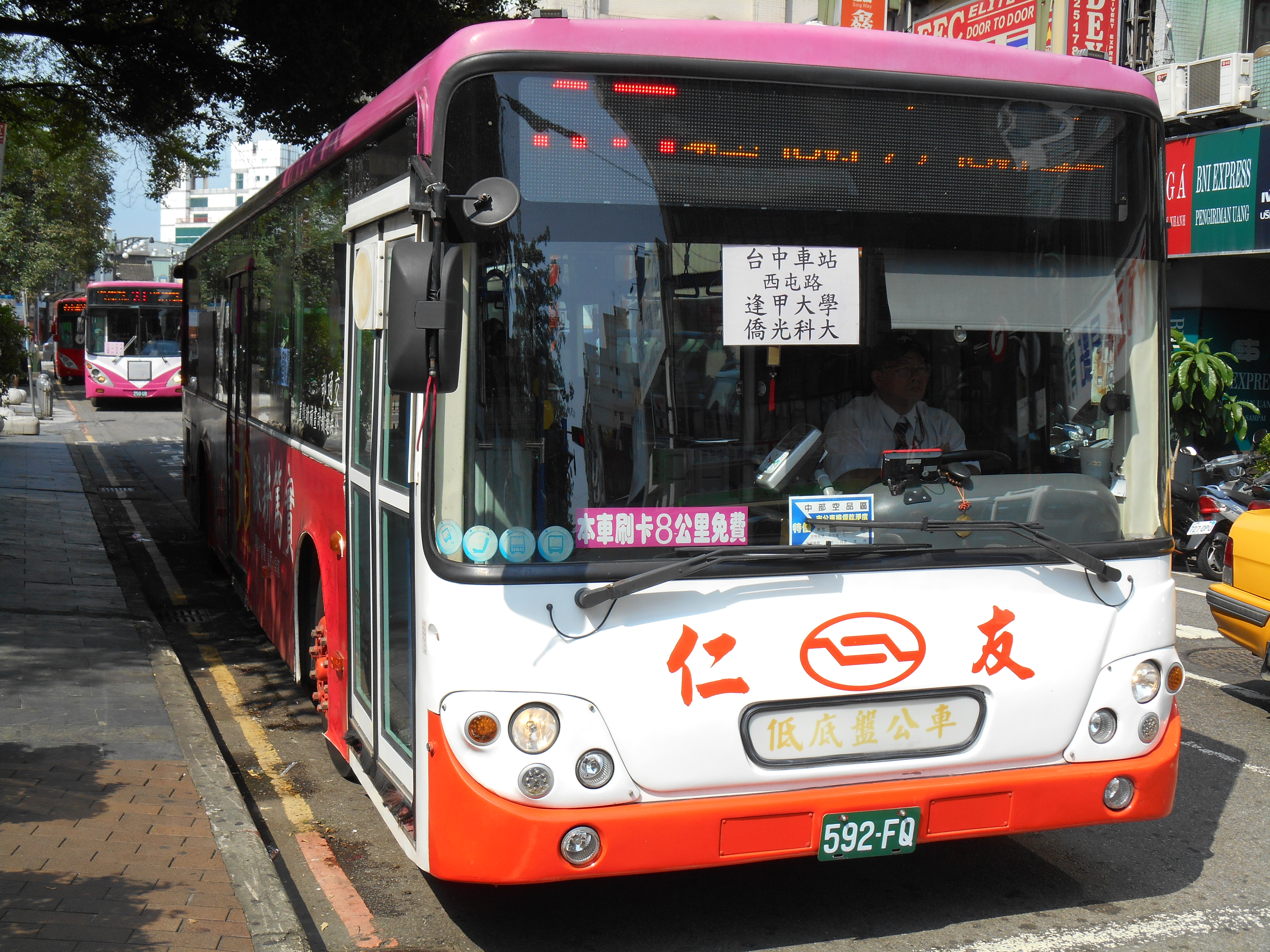 中文（台灣）: 仁友客運2010年大宇BS120CN大客車592-FQ。